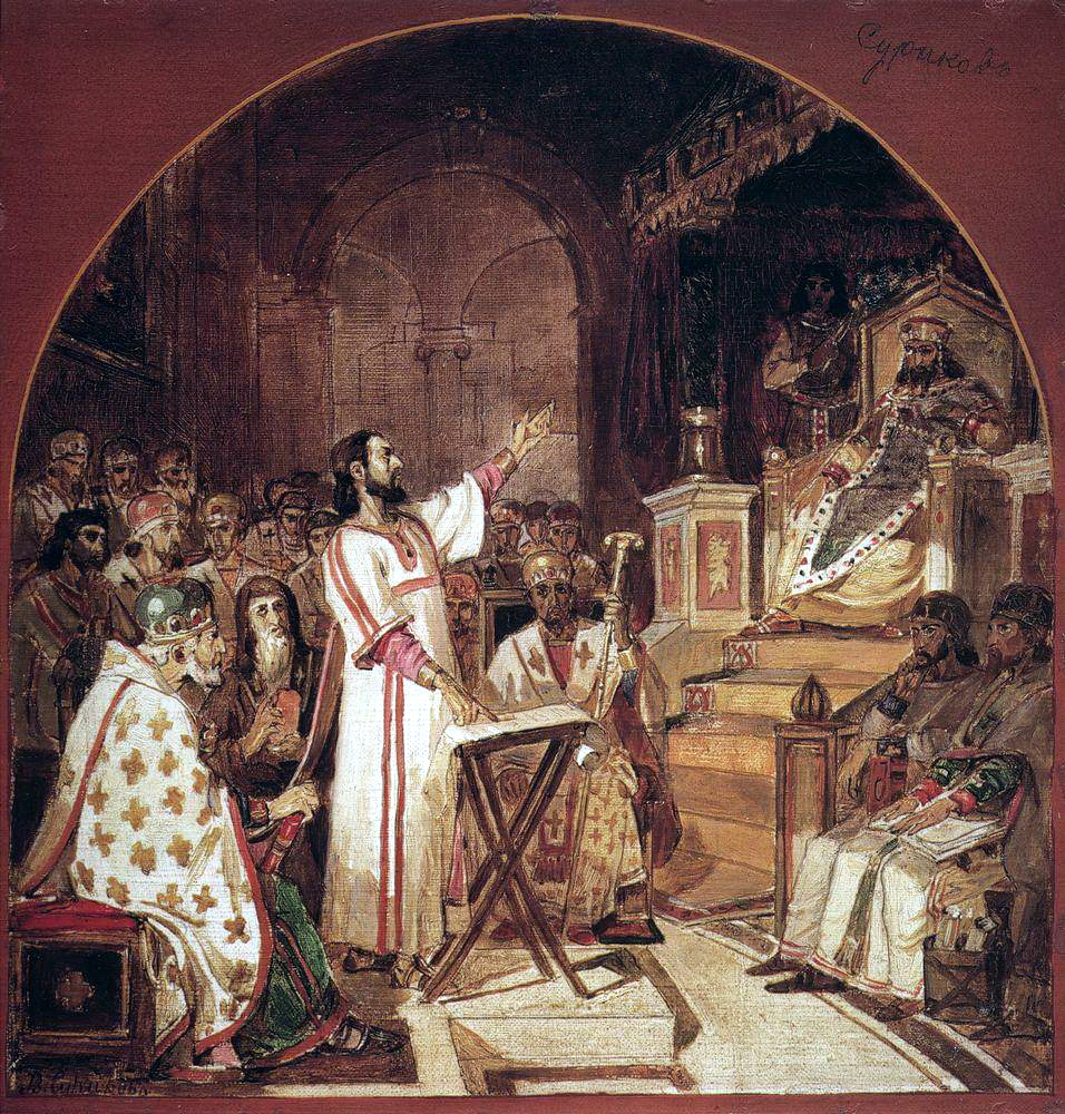 Эскиз росписи в верхней части стены на хорах храма Христа Спасителя в Москве